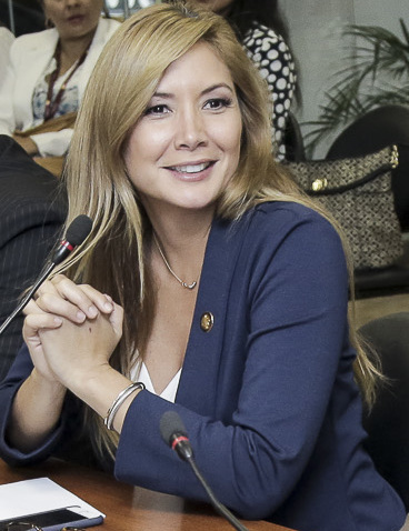 Tema: - Integración de las Comisiones Especializadas Permanentes Fotografía: Andrés Yépez / Asamblea Nacional